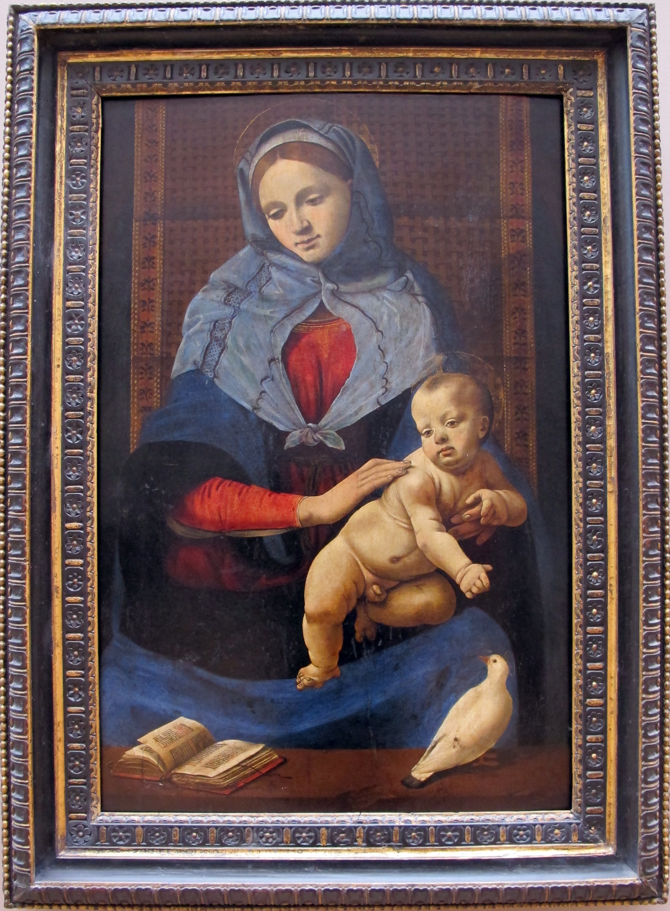 Pittura del Quattrocento italiano, Louvre